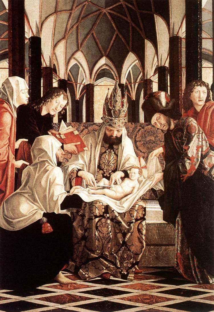 St Wolfgang Altarpiece